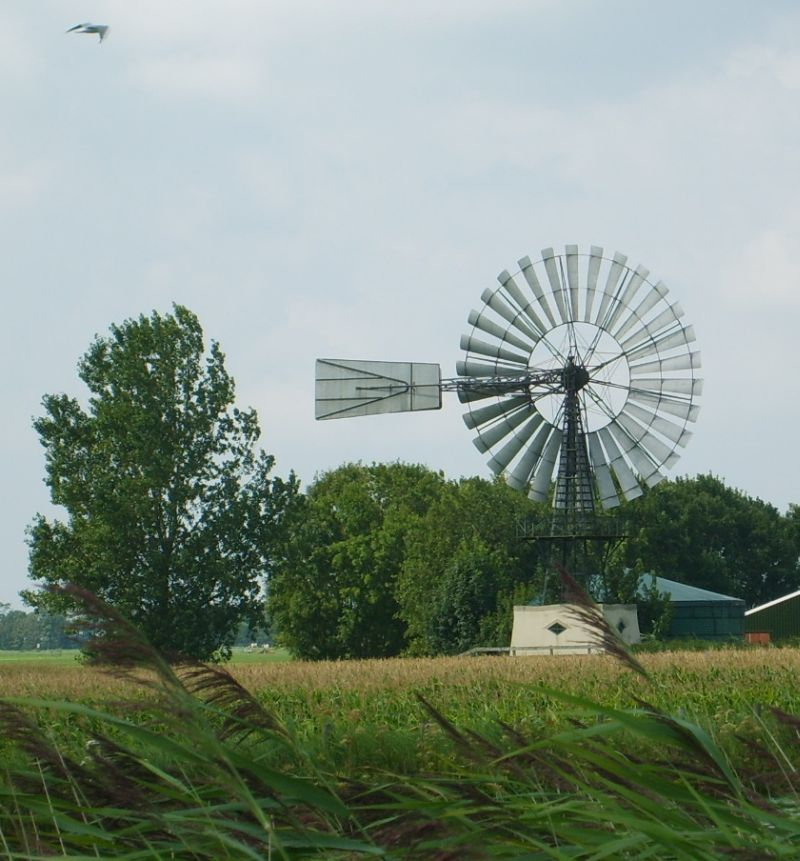 zelfgemaakte foto, Friesland, 2007. Kan vrij gebruikt worden